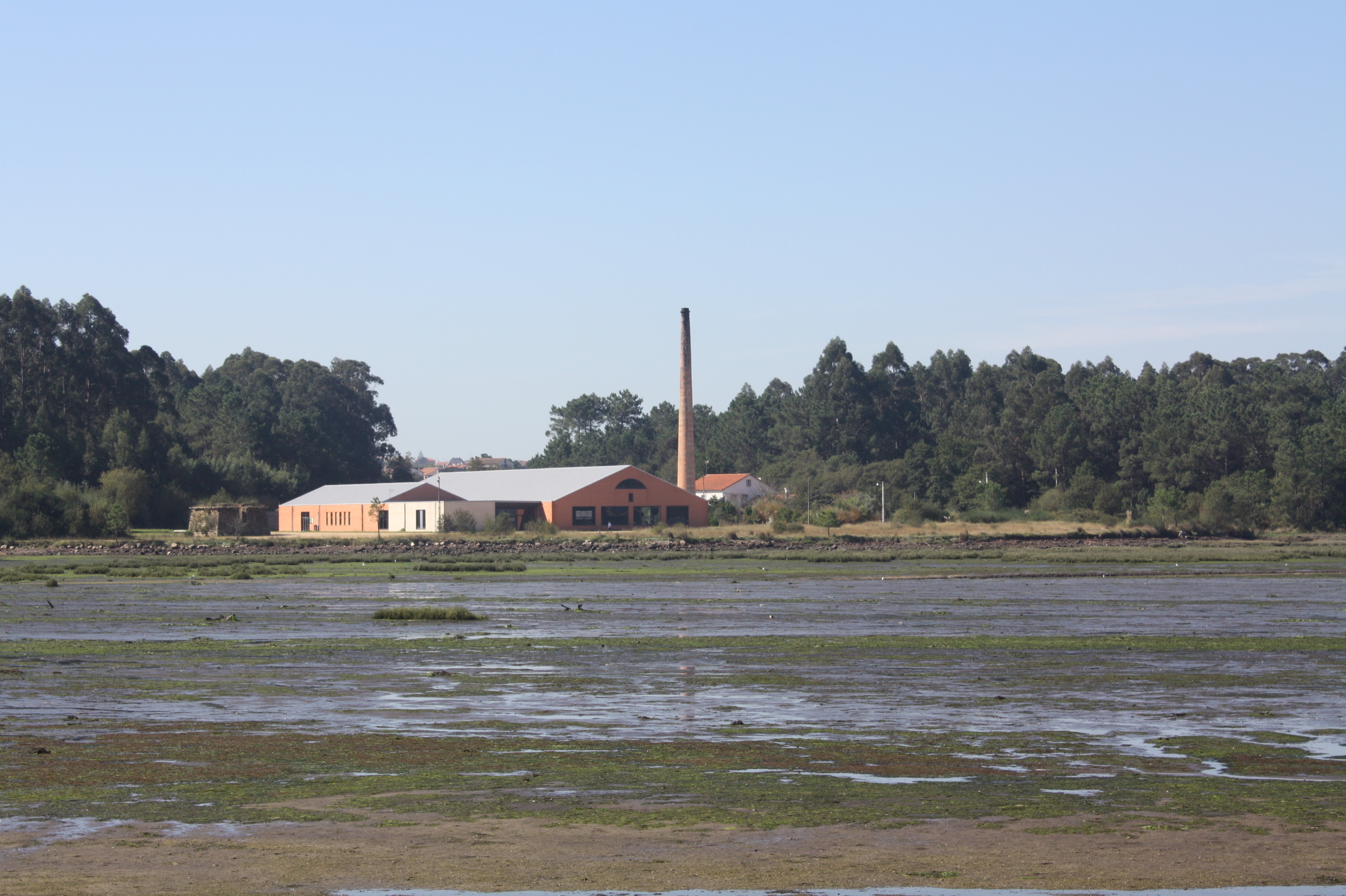 Centro de interpretación das telleiras, no lugar da Fianteira (Vilalonga, Sanxenxo). Desde o 2012, sede do Banco de Alimentos Rías Baixas